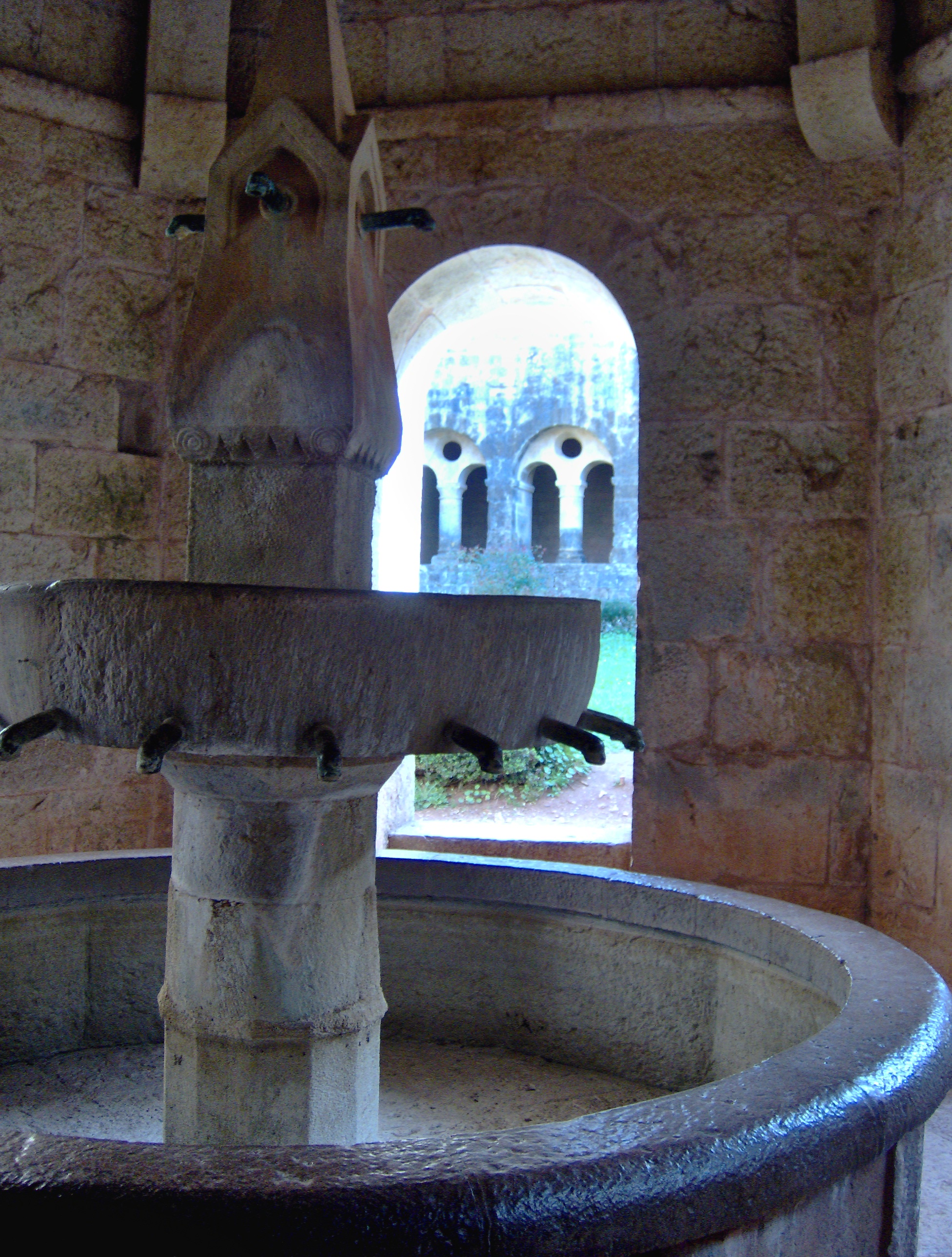 Lavabo du cloître de l'abbaye du Thoronet.